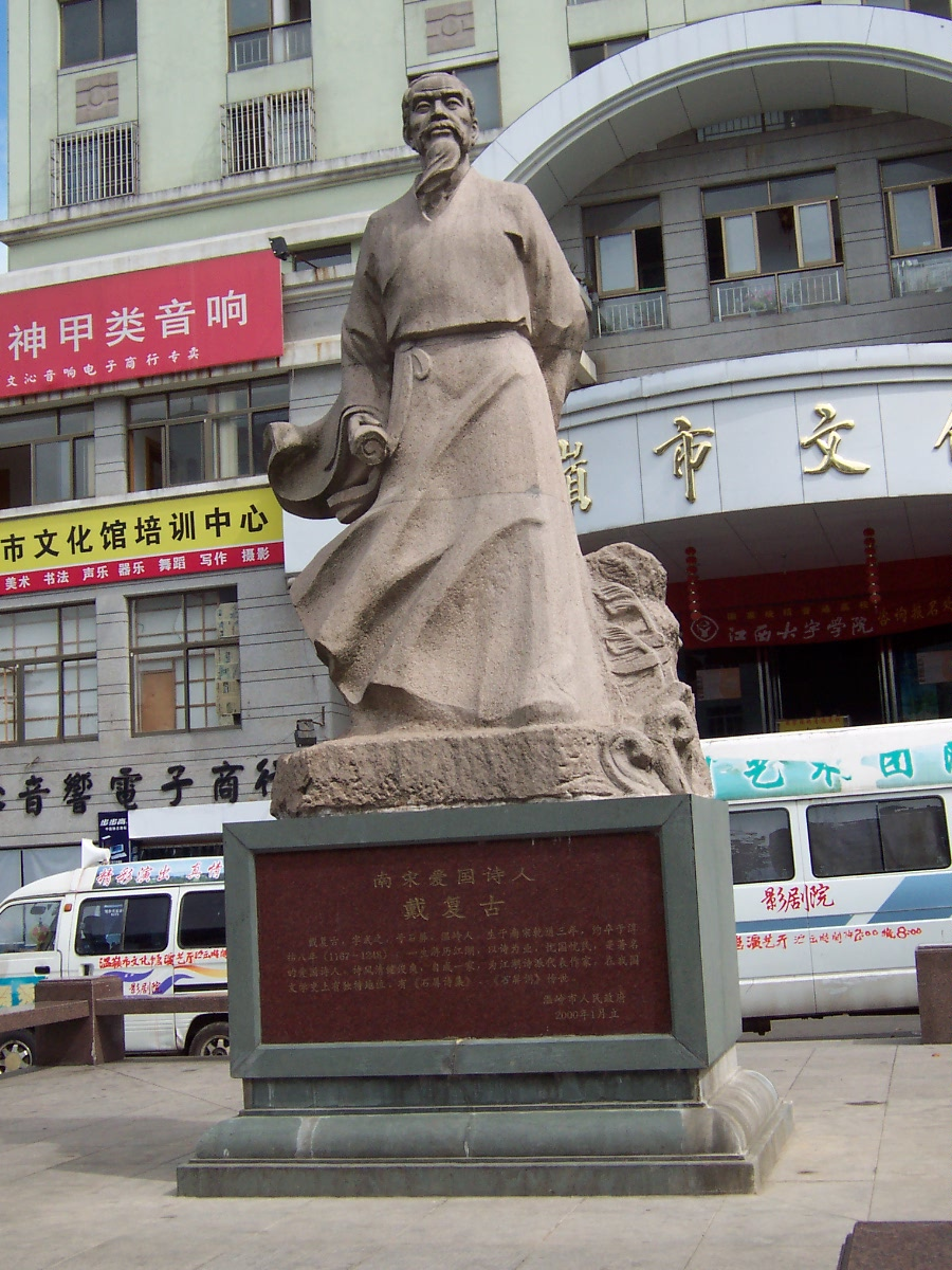 中文（中国大陆）: 位于温岭市区的戴复古塑像